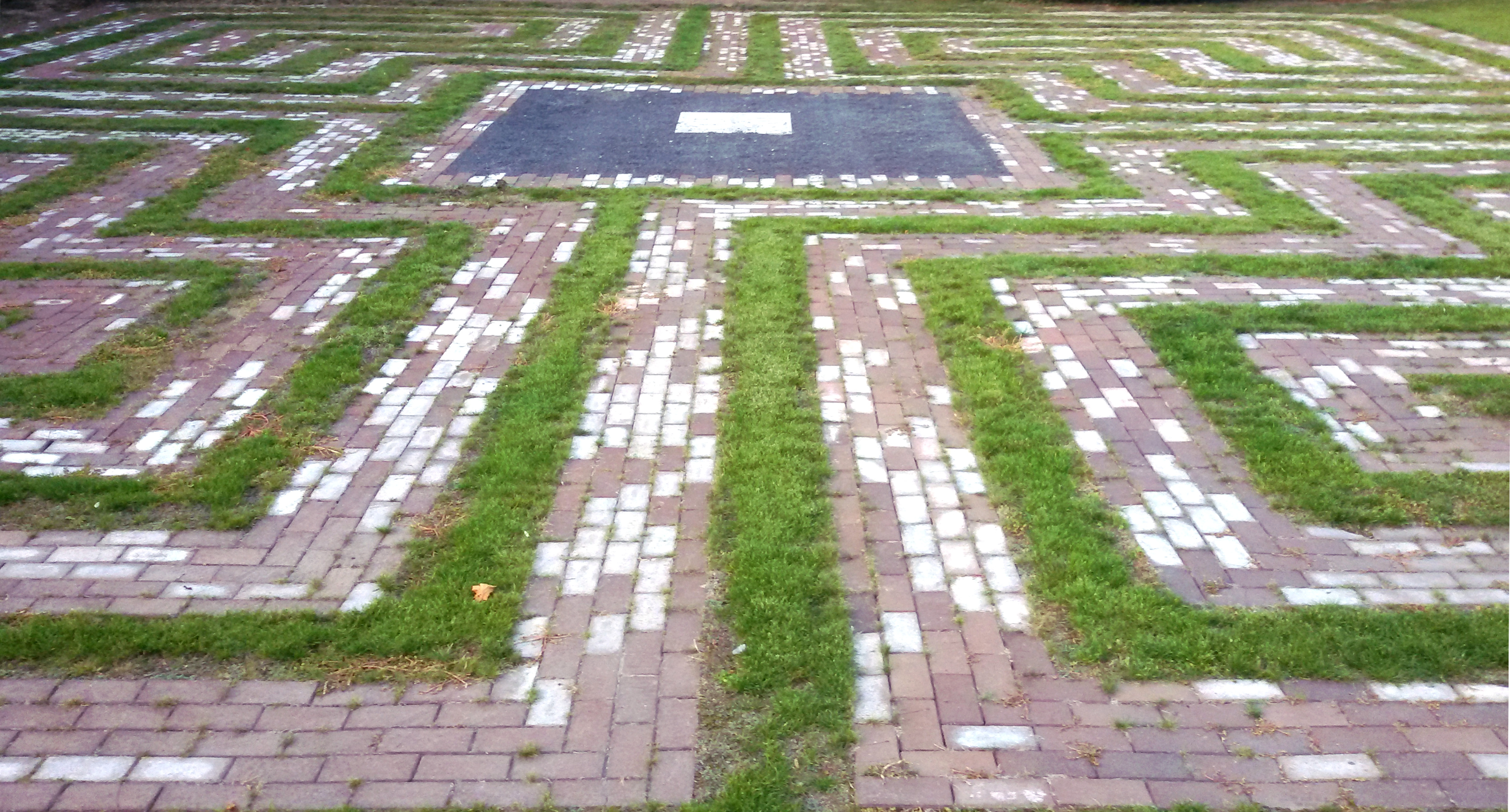 Römisches Labirynth am Friedhof der St. Gerebernus-Kapelle. Es wurde 2017 errichtet.